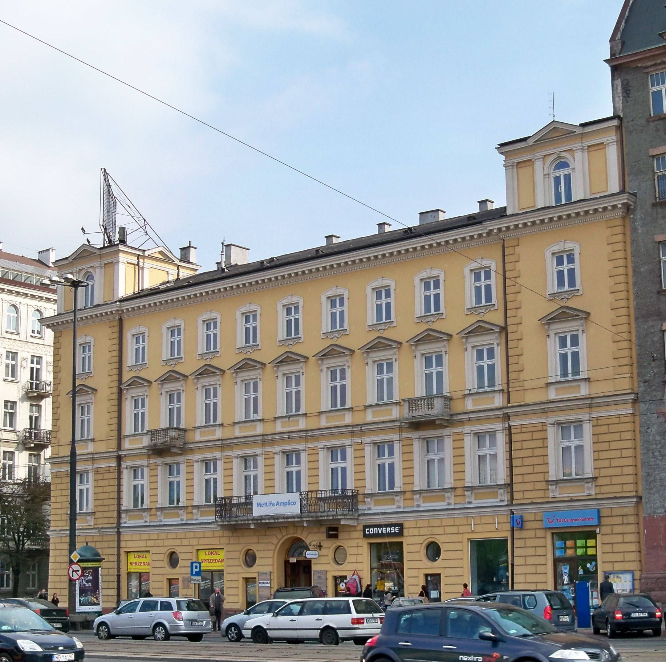 Kamienica Łapińskiego w Warszawie. Aleje Jerozolimskie 55.